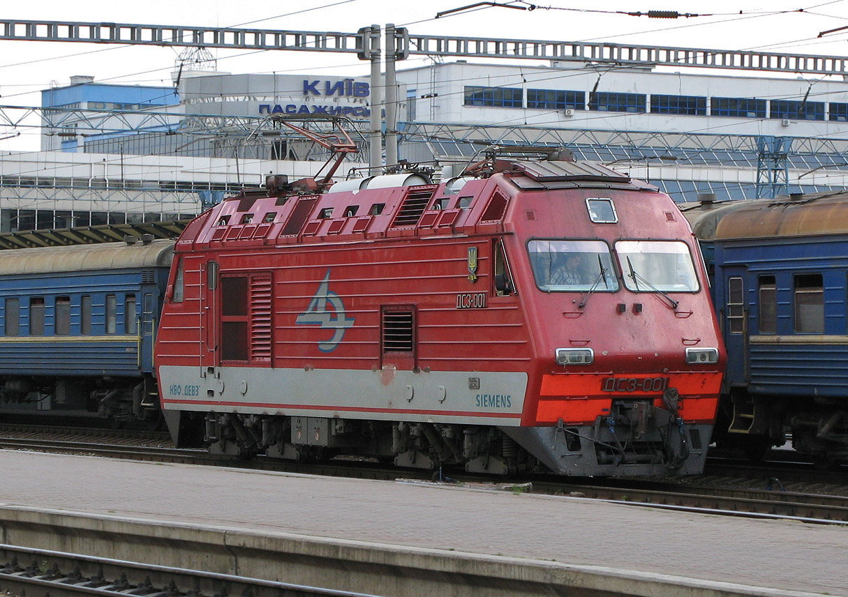 Електровоз ДС3-001